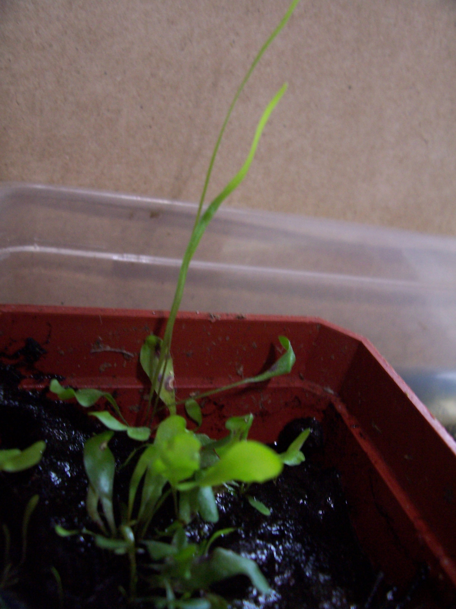 Utricularia praelonga 's leaves.